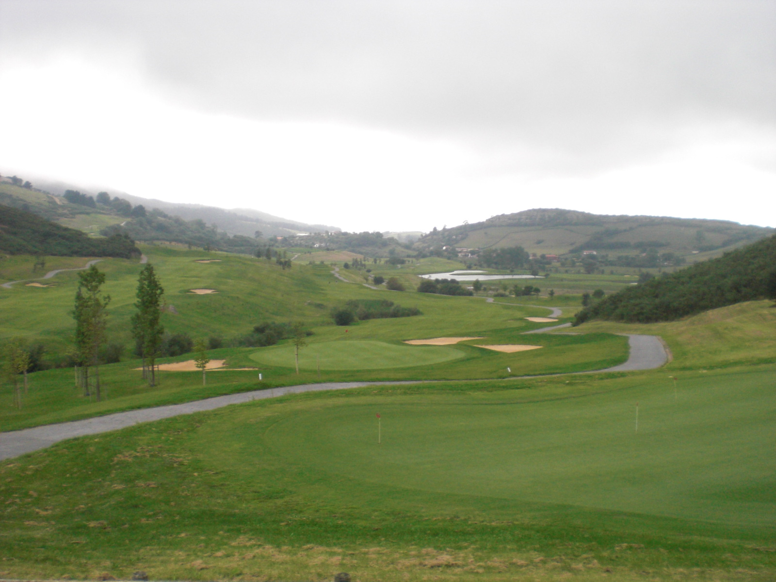 Meaztegi golf-zelaia, Trapagaran.